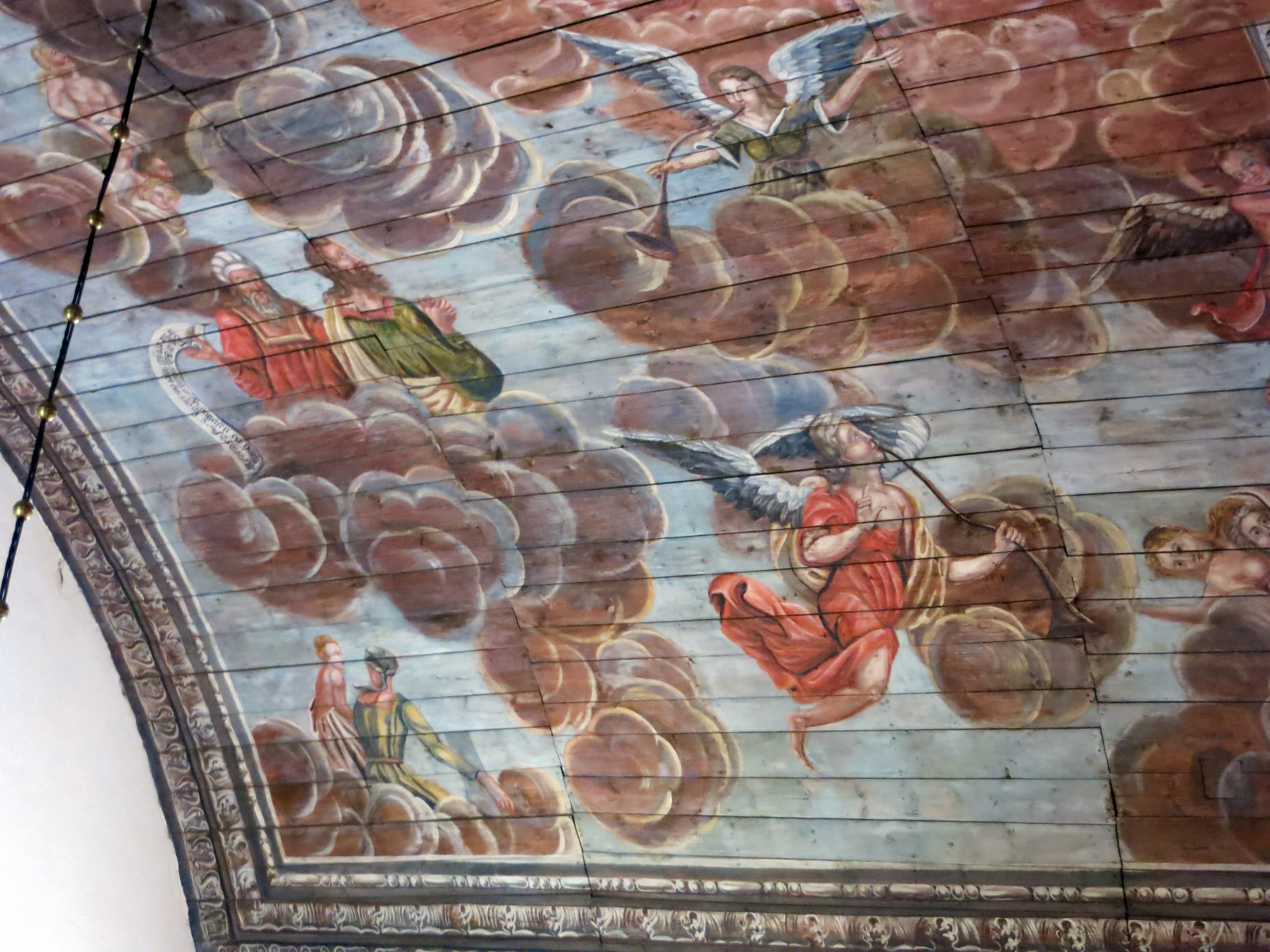 Naverstads kyrka, Bohuslän Takmålning av Christian von Schönfeldt. Detalj.